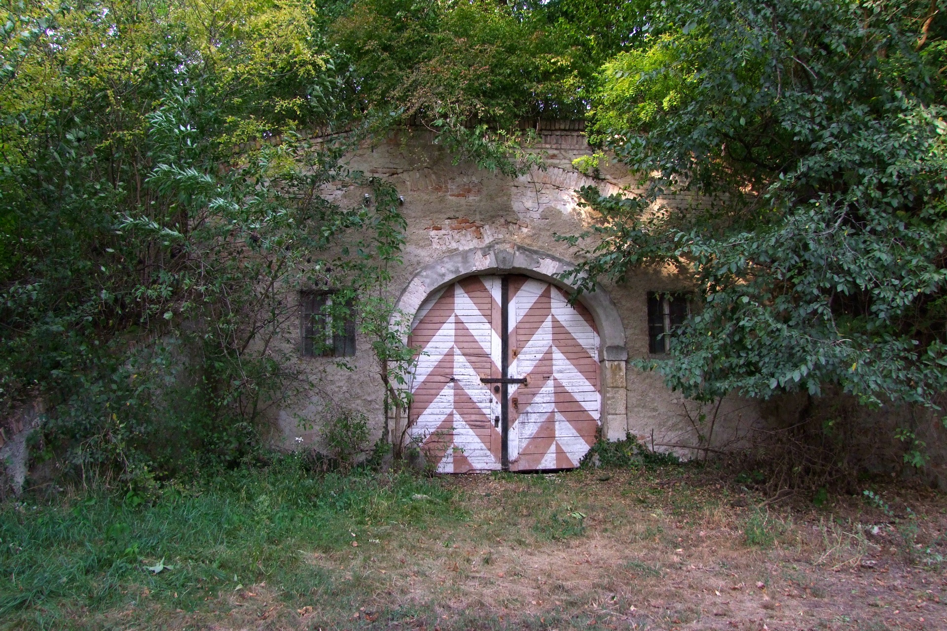 Herrschaftskeller